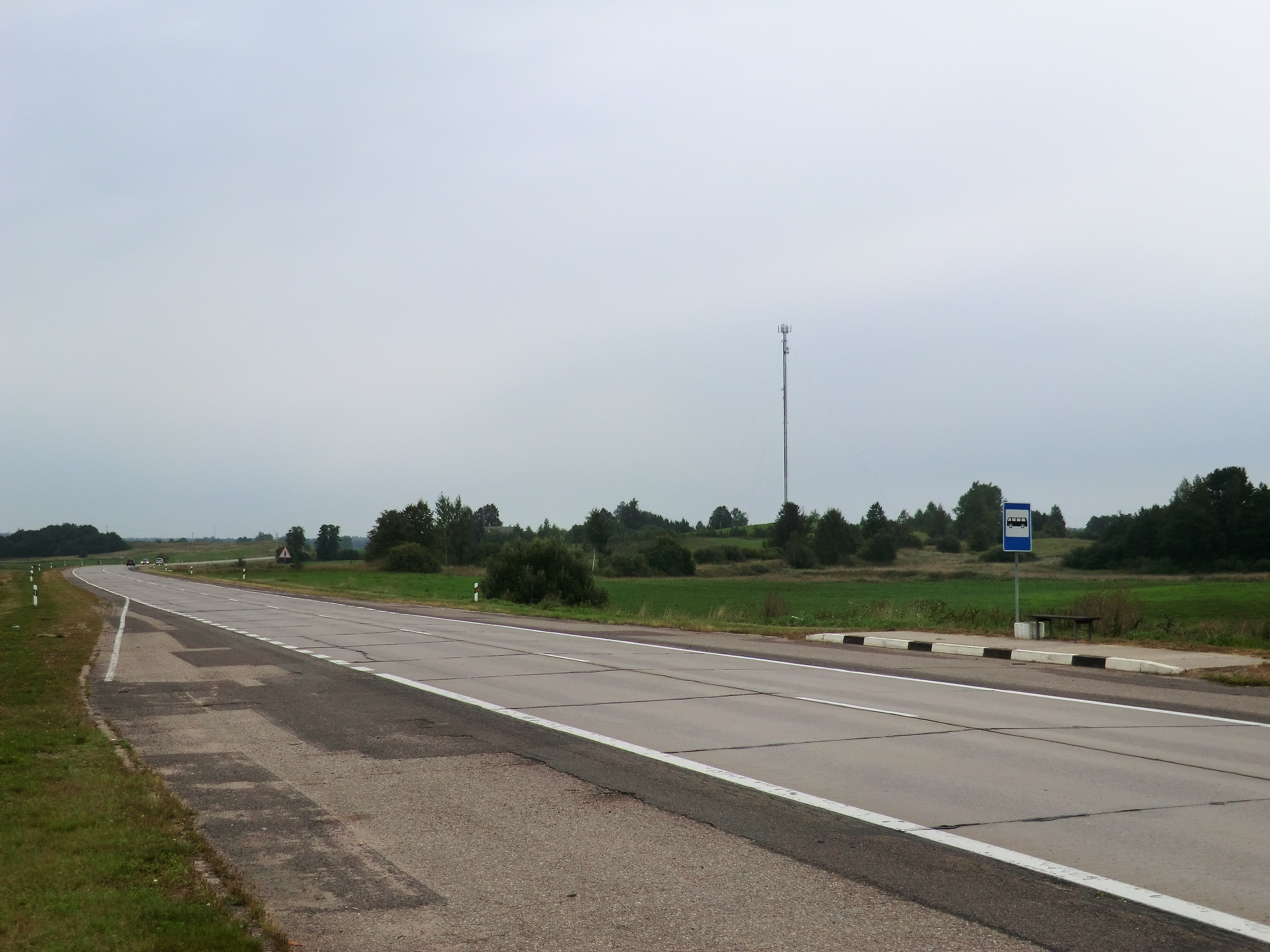 Suginčių sen., Lithuania